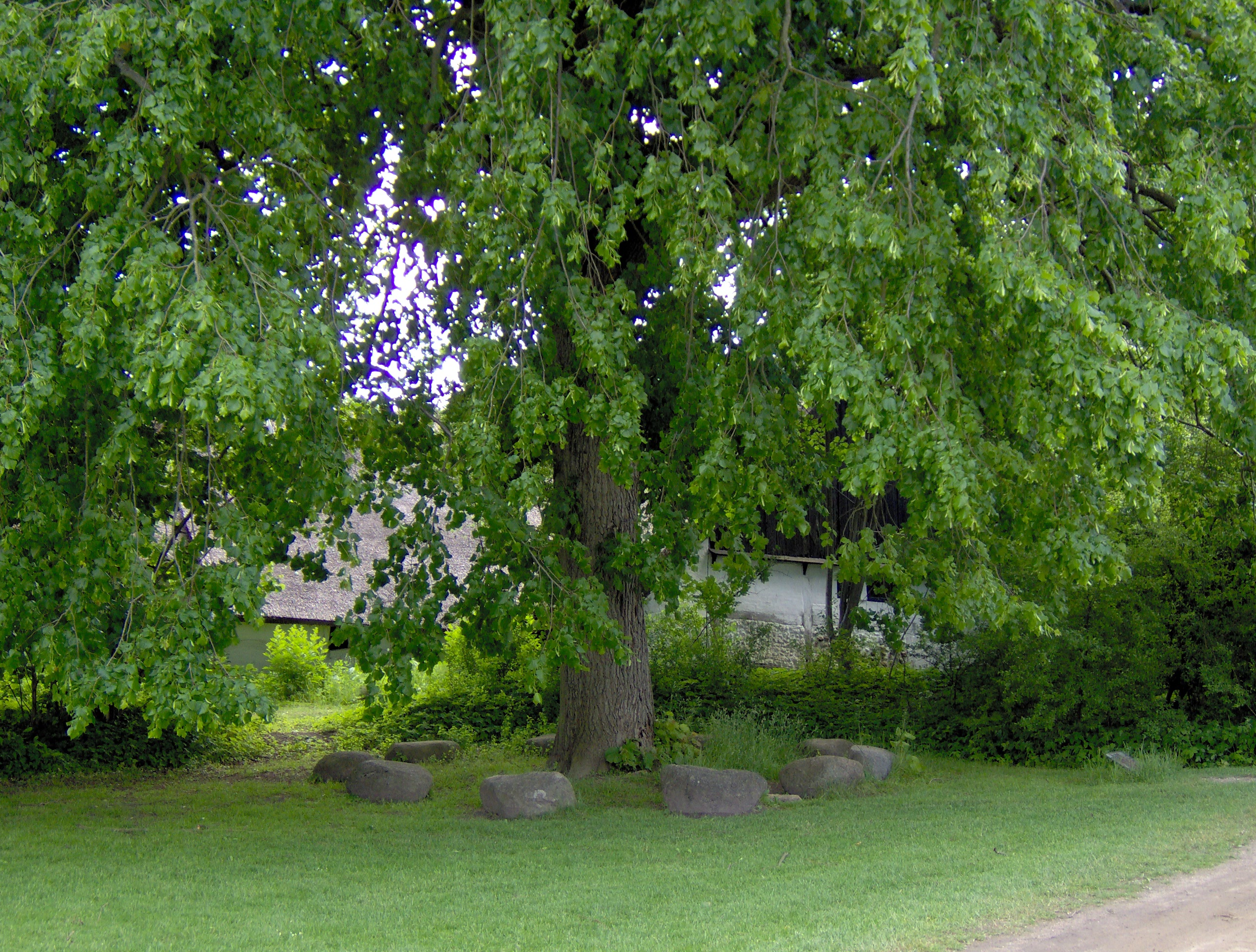 Fotograferet på Frilandsmuseet ved København